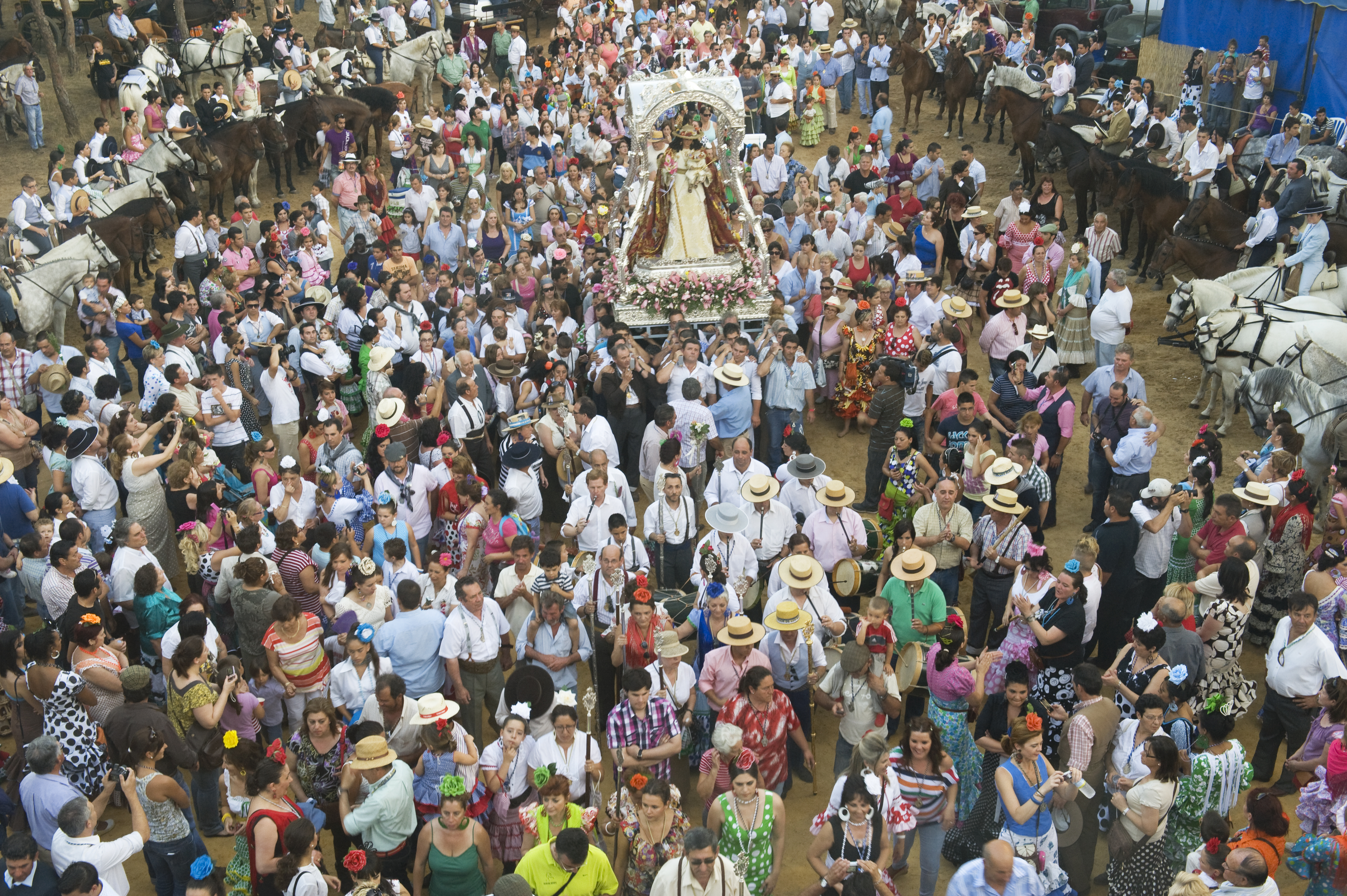 LLegada de la Virgen de los Remedios a su Ermita en el día de su Romeía